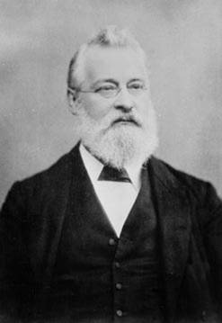 John Alexander Reina Newlands (26 november 1838 – 29 juli 1898) was een Brits scheikundige die in 1863 het eerste periodiek systeem opstelde.